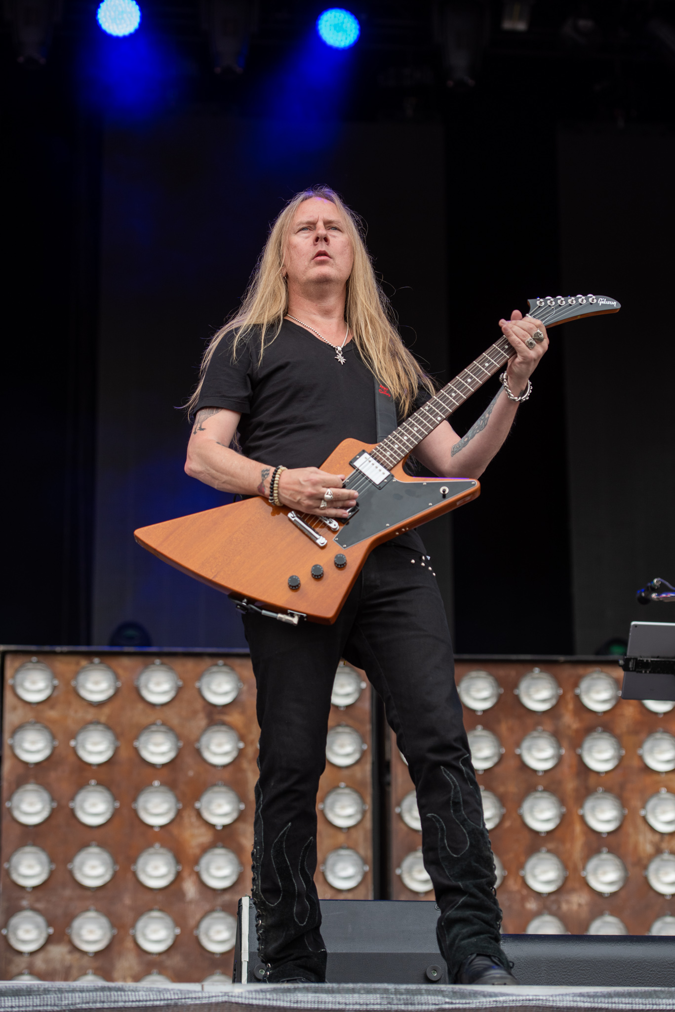 ARGO-Konzerte,Alice in Chains,Jerry Cantrell,Konzert,Livekonzert,Livemusik,Musik,RiP,Rock im Park 2019,Zeppelin Stage